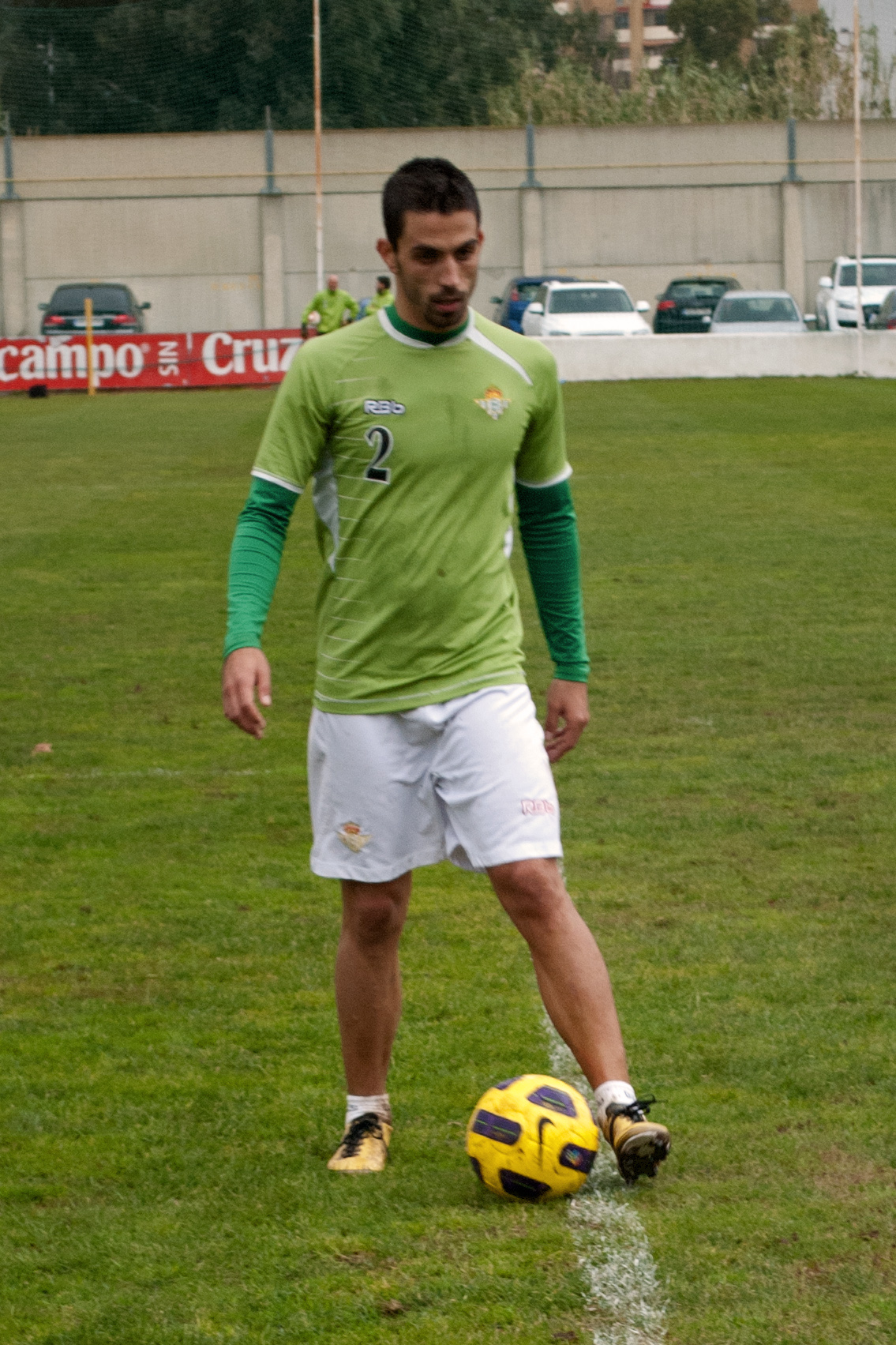 José Isidoro Gómez, futbolista del Real Betis en la temporada 2010-01, durante un entrenamiento en la ciudad deportiva del Betis.